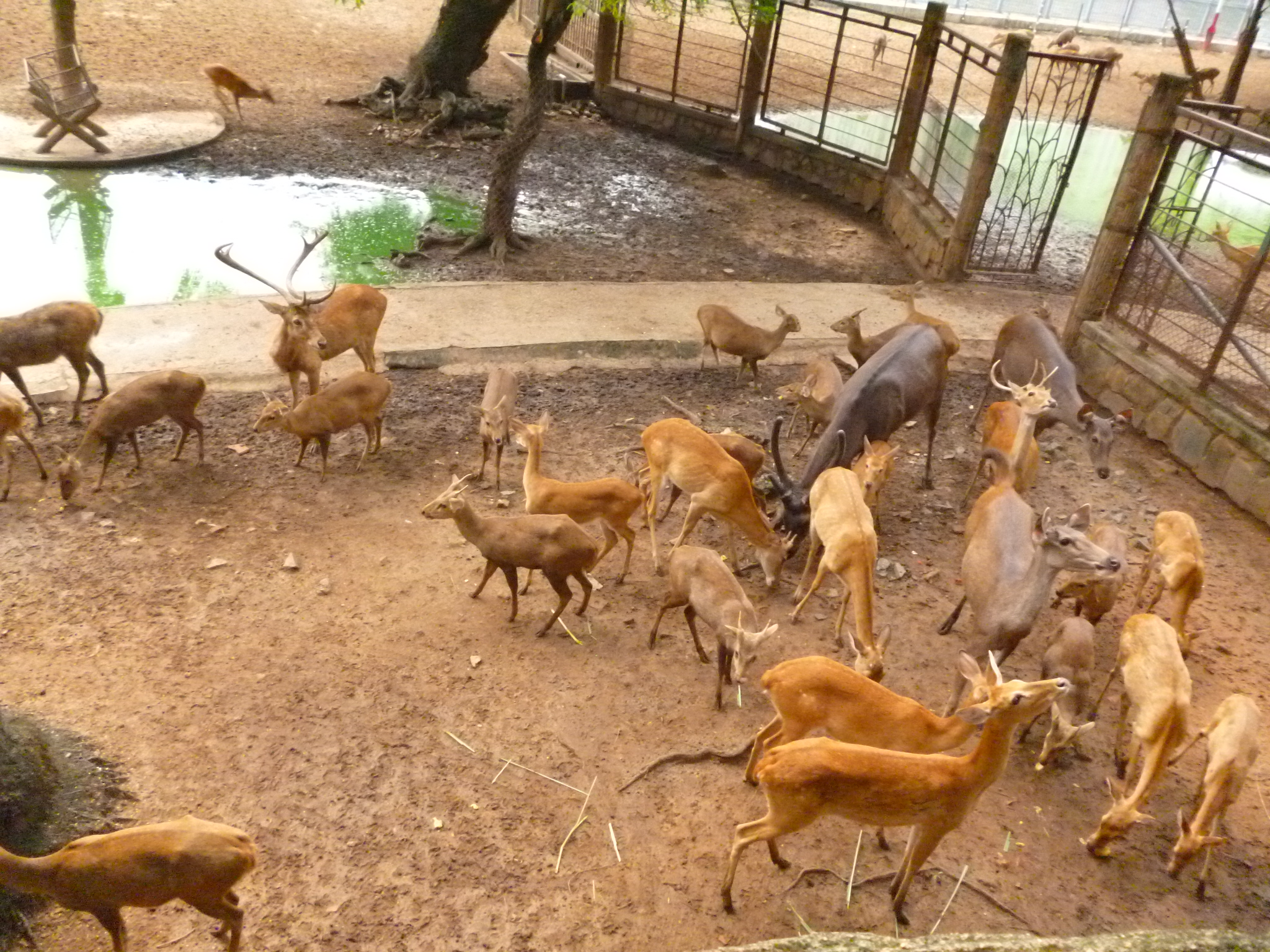 Hình chụp về nai vàng và nai đen ở Thảo Cầm Viên